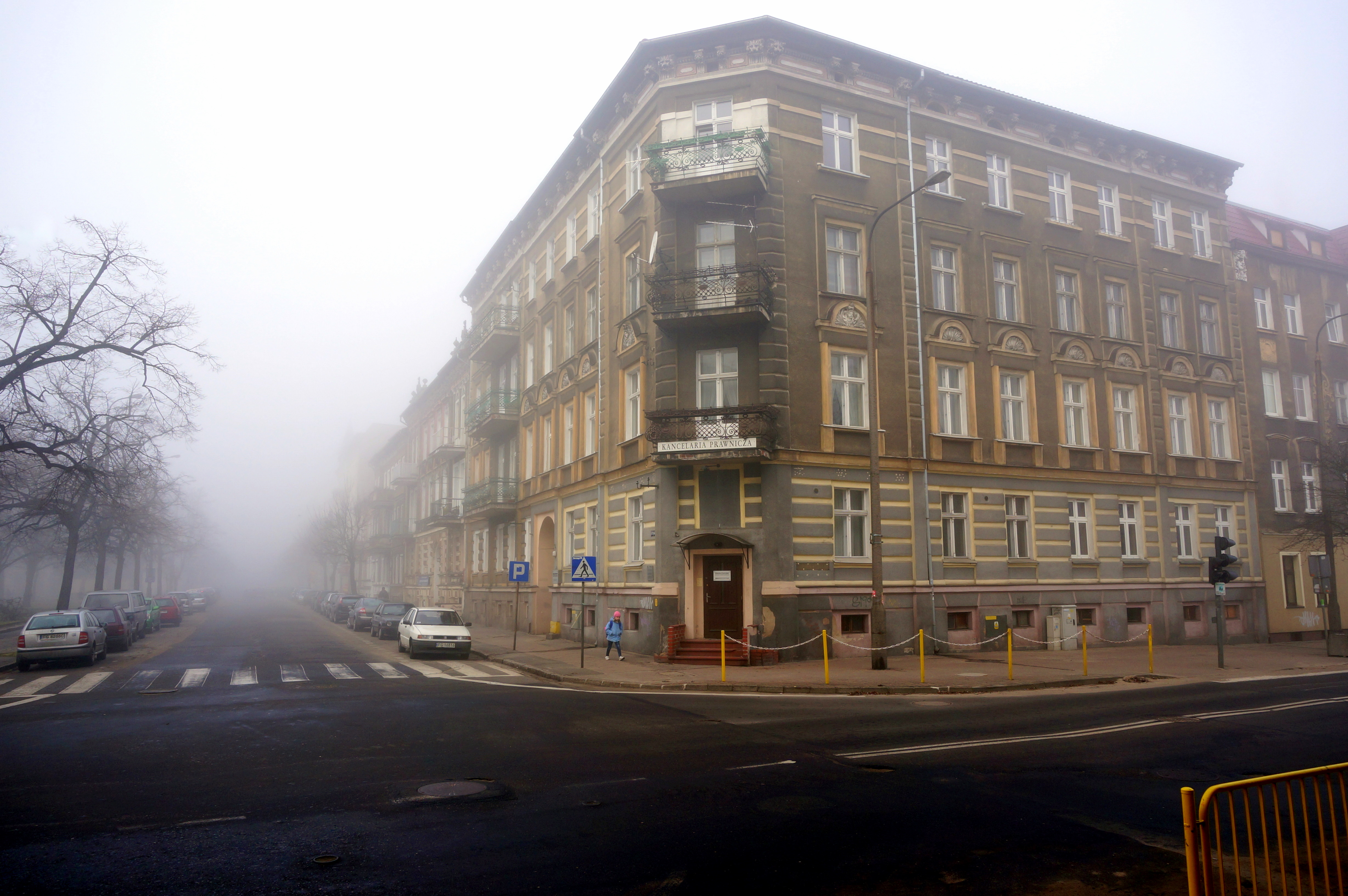 Gorzów Wielkopolski, ul. Krzywoustego 1 - kamienica, koniec XIX w.